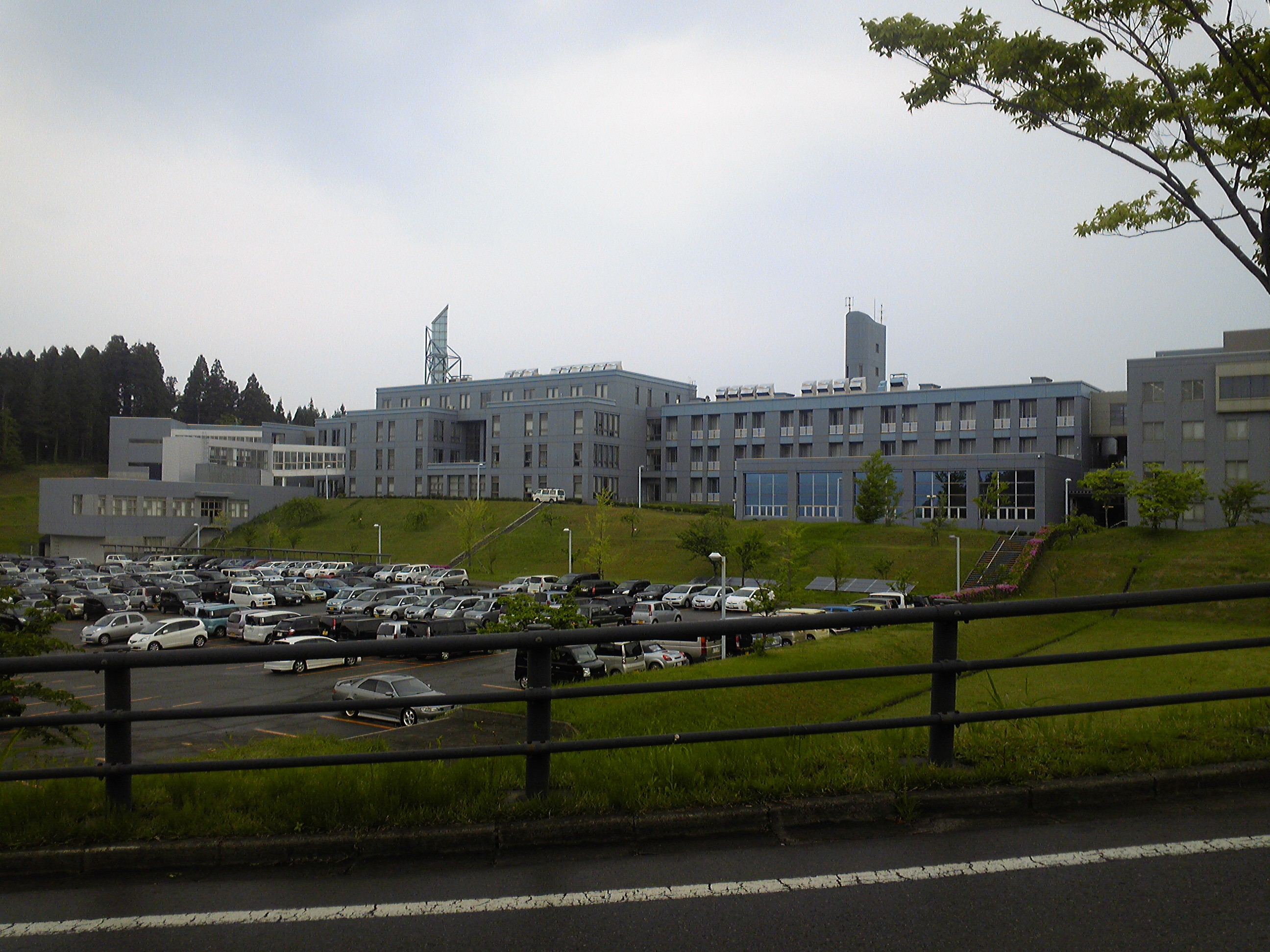 新潟工科大学